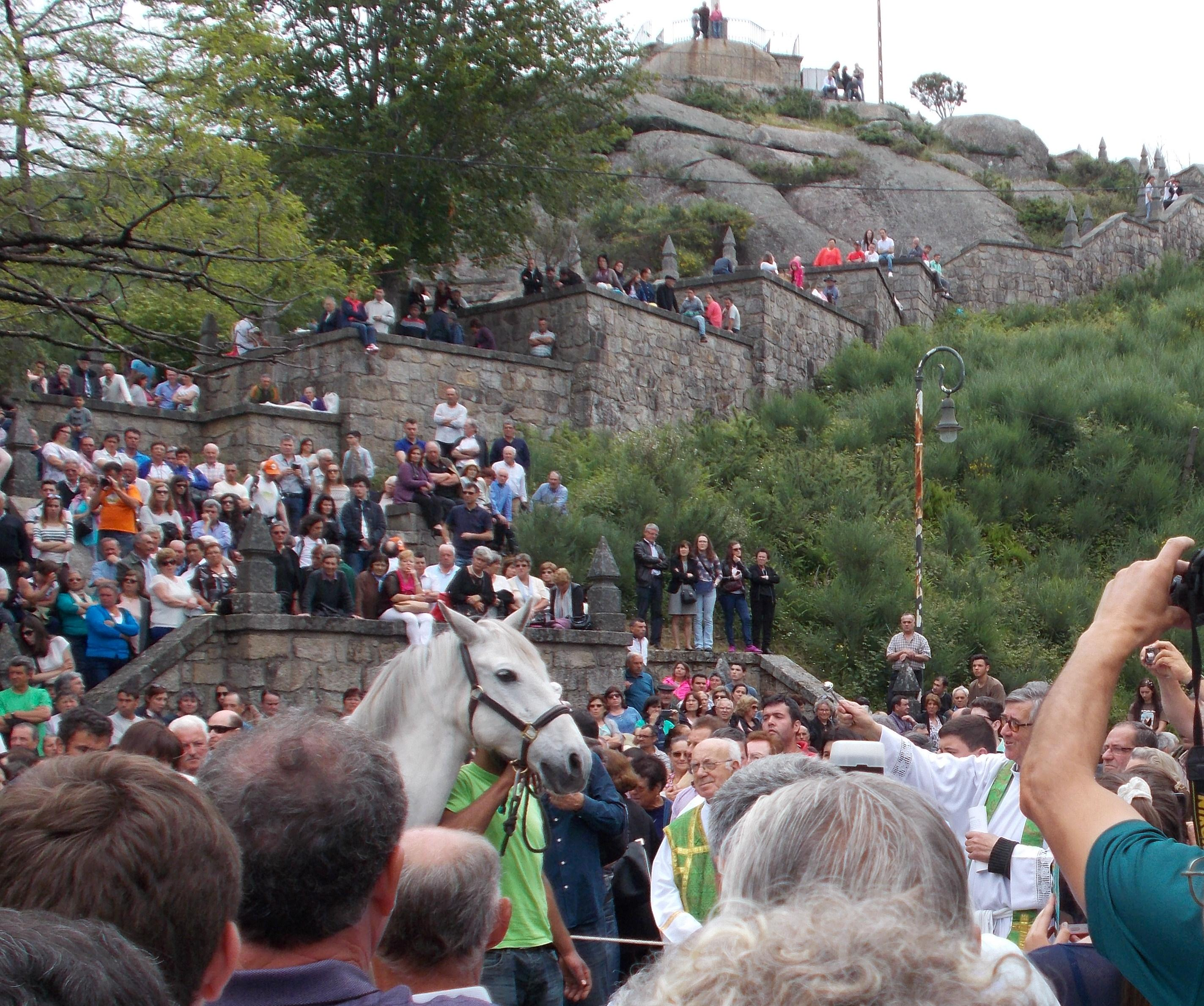 Benção dos animais, no mosteiro de santo António de Mixões da Serra, Valdreu, Vila Verde